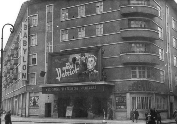 Berlin, Luxemburgplatz, Kino "Babylon" 30 Jahre sowjetische Filmkunst. Anläßlich des 30jährigen Bestehens der sowjetischen Filmkunst wurde im Uraufführungstheater Babylon in Berlin der Film Der große Patriont gezeigt, der das Leben Kirows behandelt. Aufn.: Illus Köhler 3 S90867 9.12.49